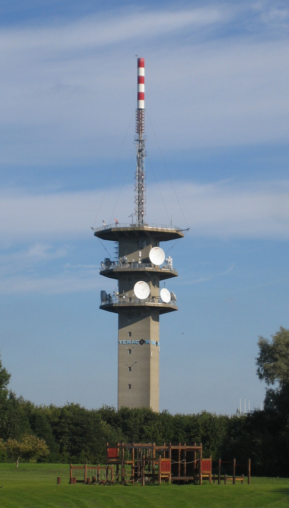 Jägersro tower in Malmö, Sweden